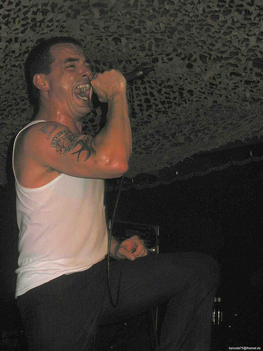 Street-Dogs-Sänger Mike McColgan im Tryptichon, Münster